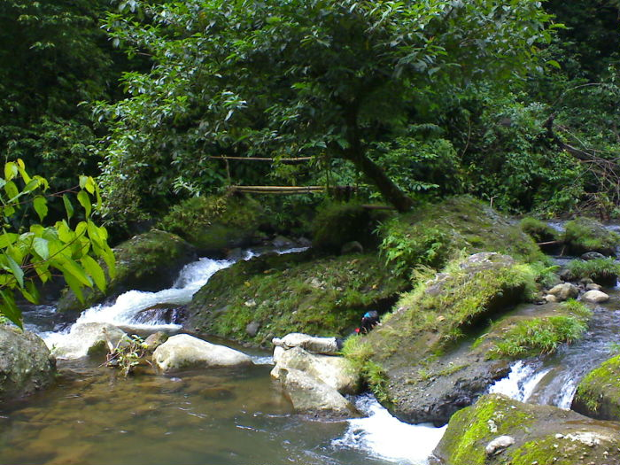 Tejakembang, Cibeet